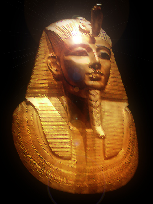 Máscara funeraria de Psusenes I Máscara funeraria del farón Psusennes I exhumada de la Tumba III de Tanis (delta del Nilo). El material utilizado es oro (diferentes piezas ensabladas con clavos), excepto para las cejas y el contorno de ojos, que son de lapislazuli, y los ojos que son de pasta de vidrio. Sus atributos son el nemes, el ureo o cobra en la frente, la barba ritual que, al estar trenzada, simboliza la muerte del soberano, así como el pectoral o usej. Se conserva en el Museo Egipcio de El Cairo. XXI dinastía (cc. 1039 adC-990 adC)